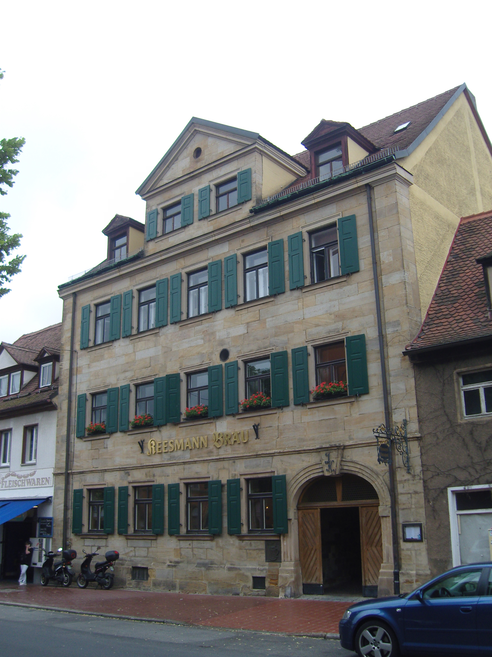 Denkmalgeschütztes Brauhaus Keesmann in der Wunderburg 5 in BambergThis is a photograph of an architectural monument.